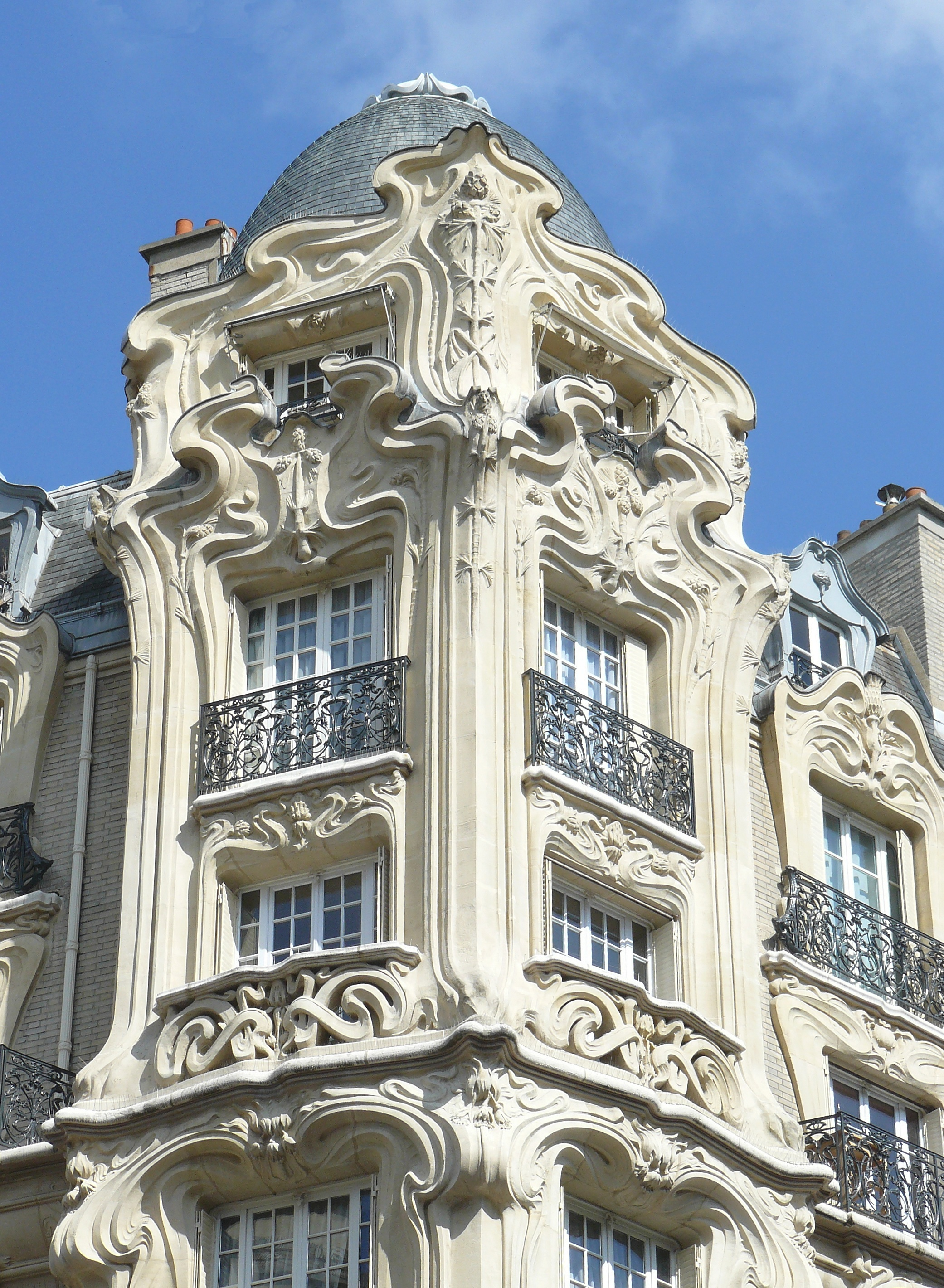 Immeuble en coin, rue de l'église et de la place Etienne Pernet n°24 (Paris 15e arrond.) - Art Nouveau 19O5 - architecte Alfred Wagon - Détail coin en rotonde des étages supérieurs